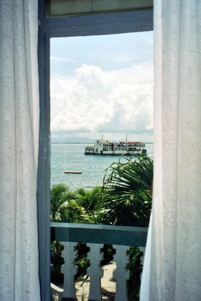 Philippinen Zamboanga City